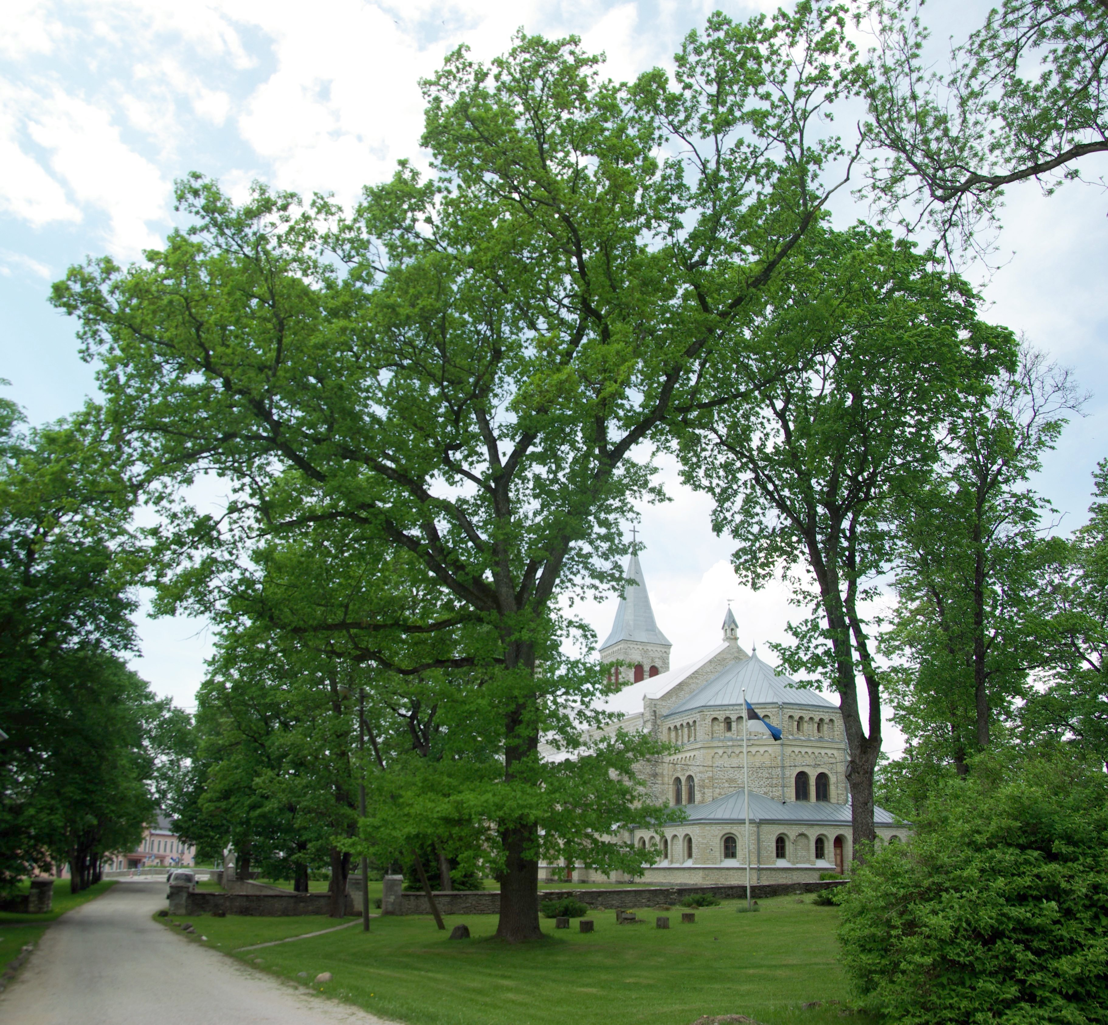 Priiuse tamm